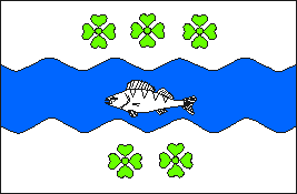 Koosa osavalla lipp